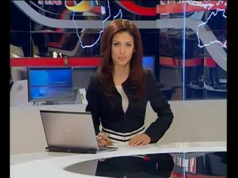 Moldovan TV presenter Vera Terentiev